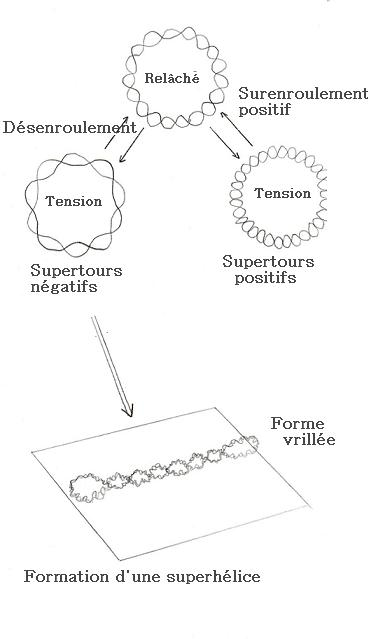 Schéma explicatif à propos des topoisomères